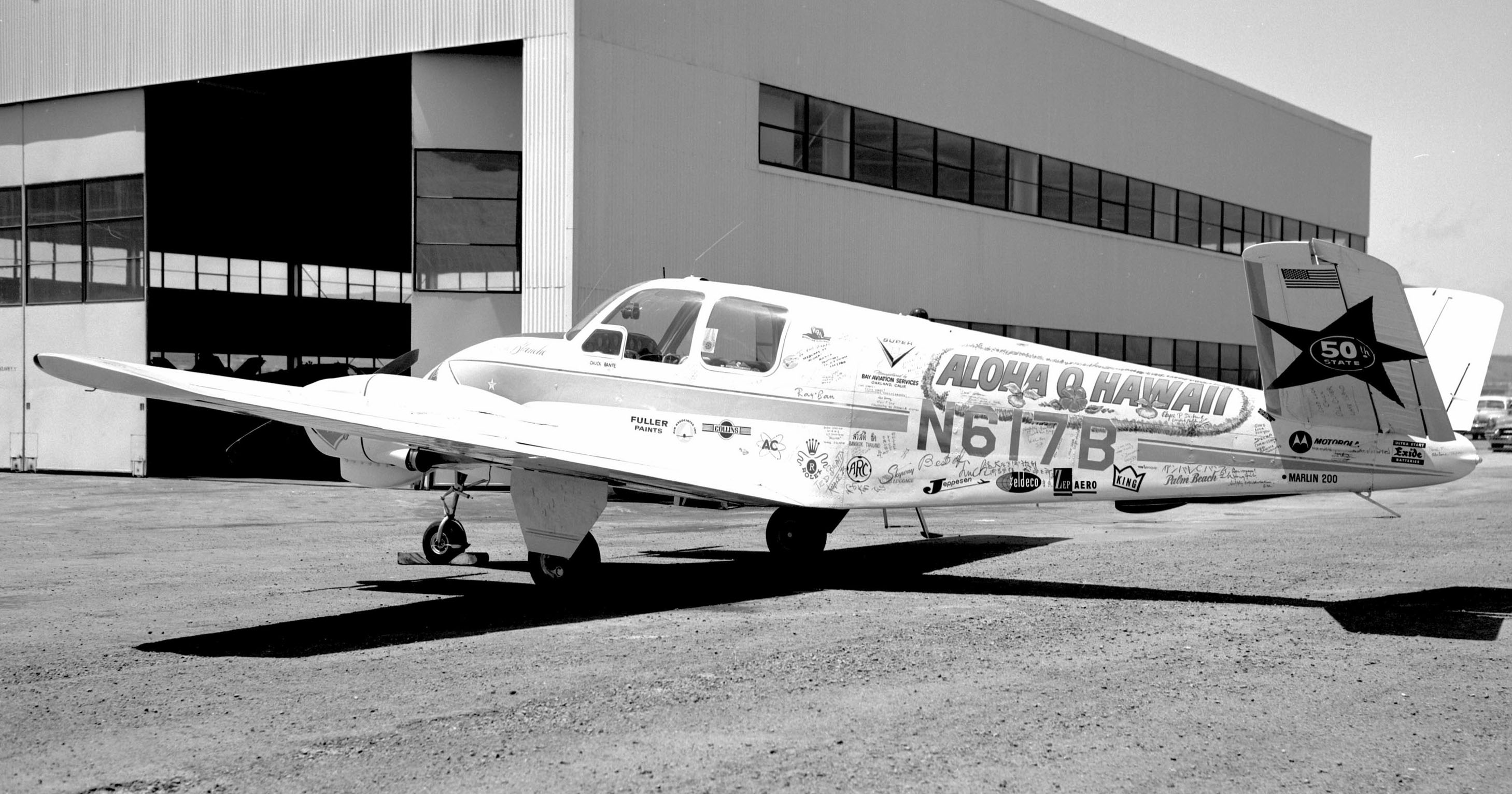 San Francisco May 1961.